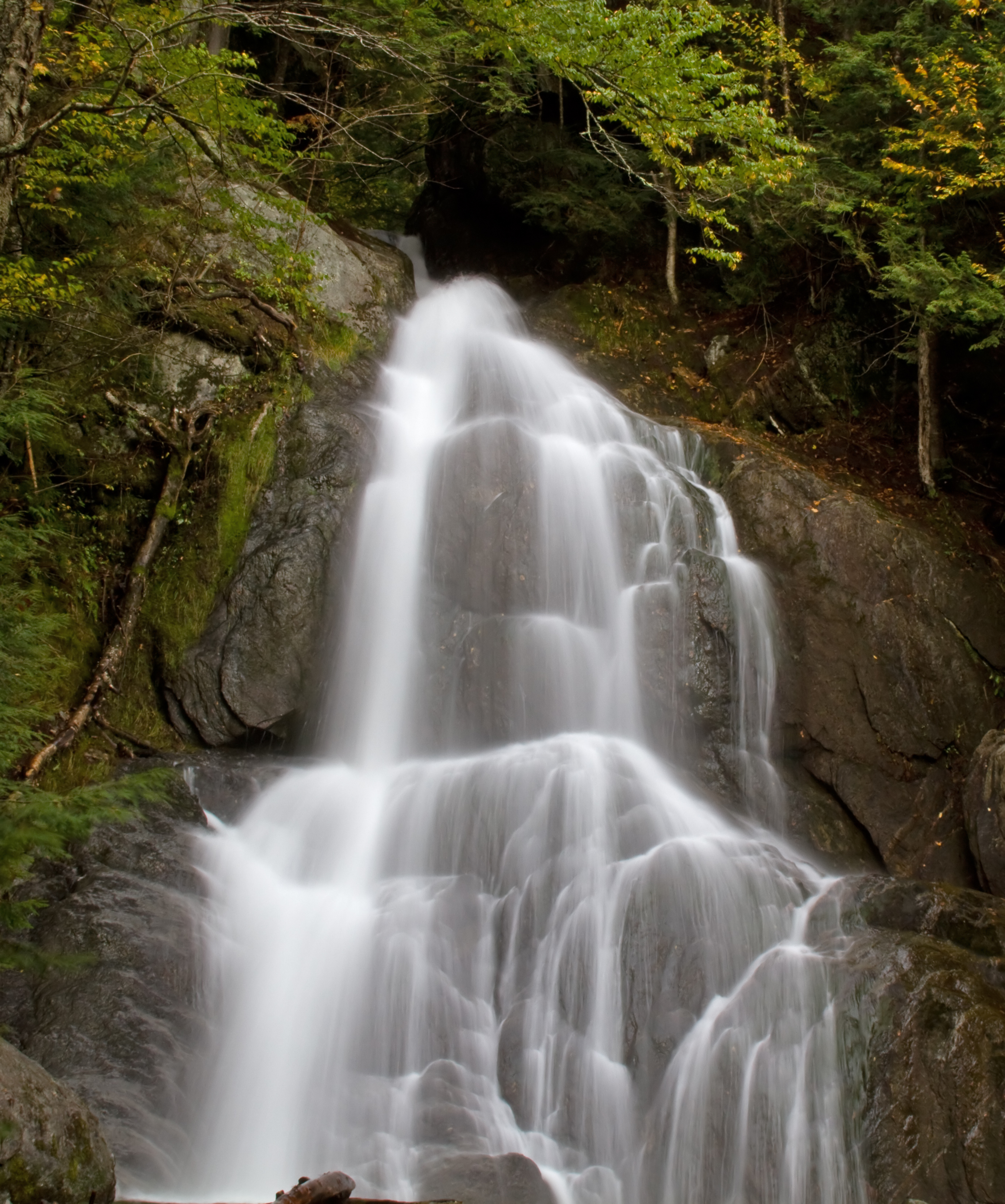 Moss Glen Falls Vermont 2